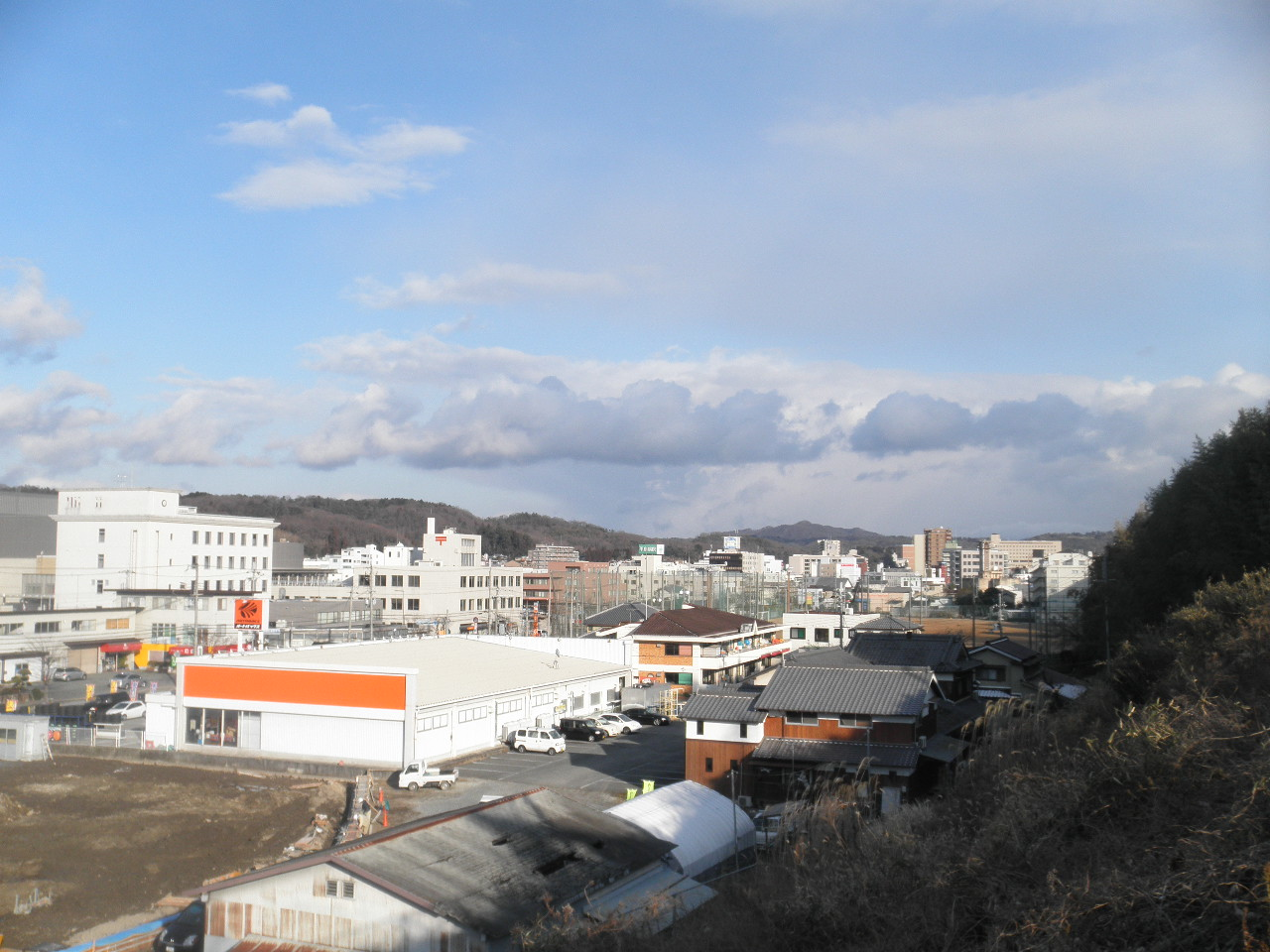 三田市街地